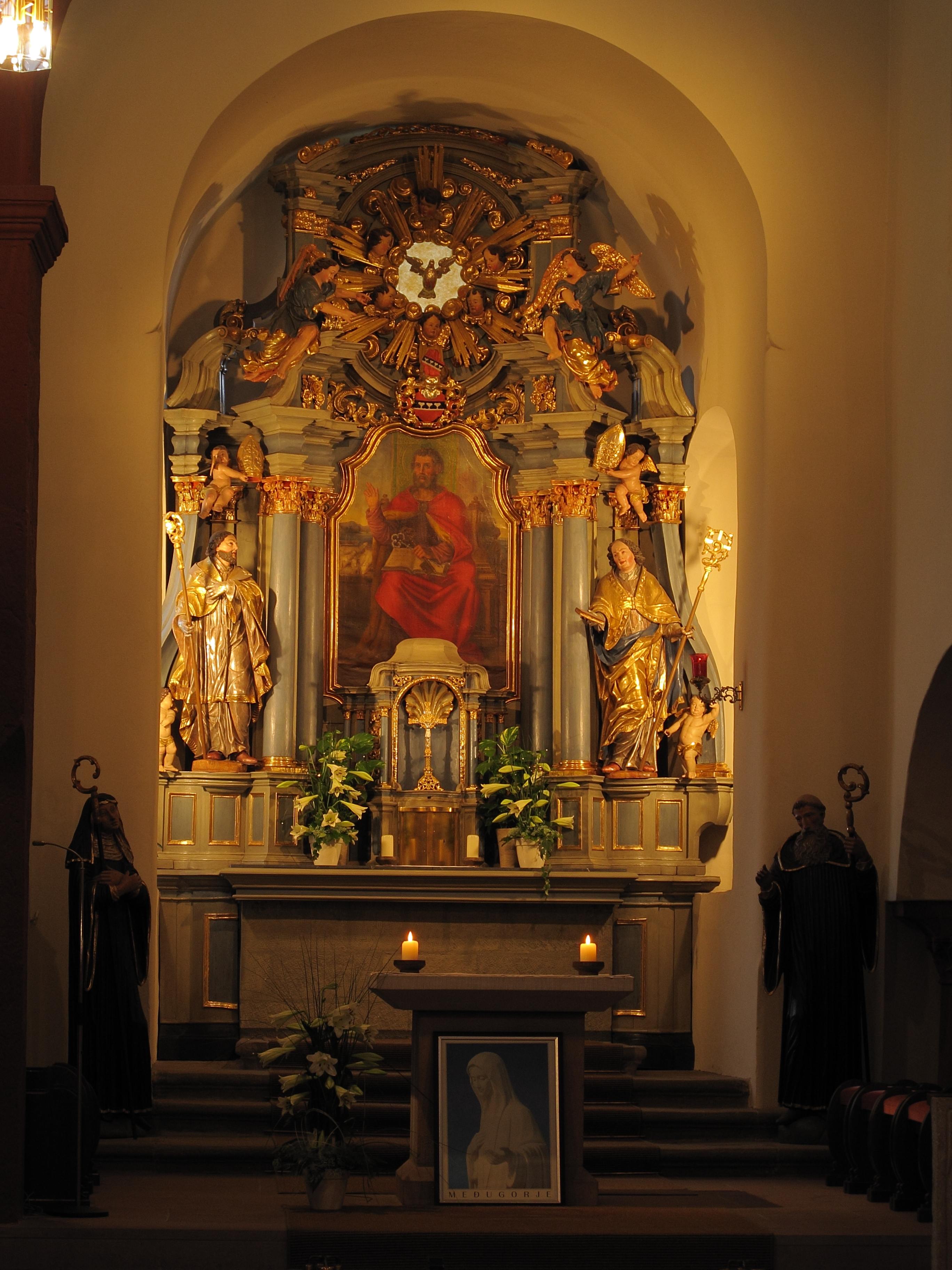 Petersberg - St.Peter (Liobakirche): Hauptaltar